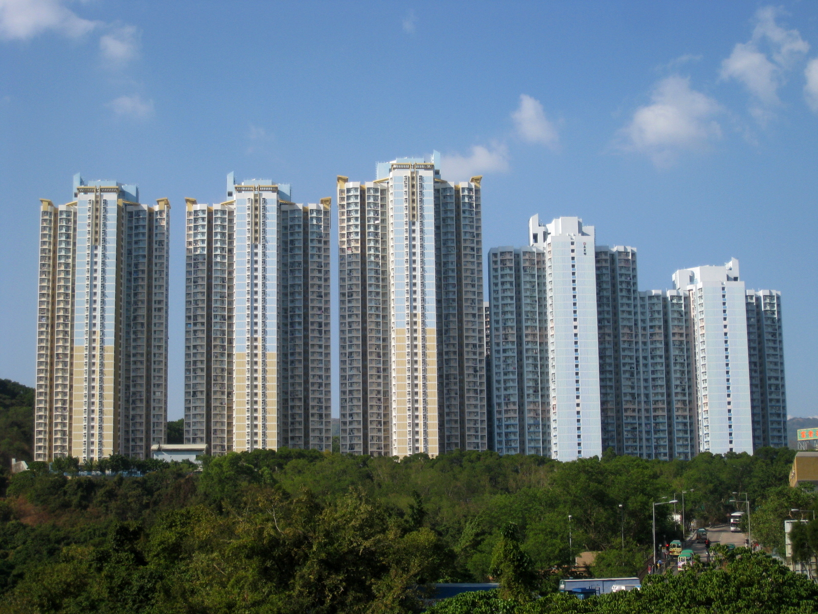 Cheung Wang Estate 長宏邨